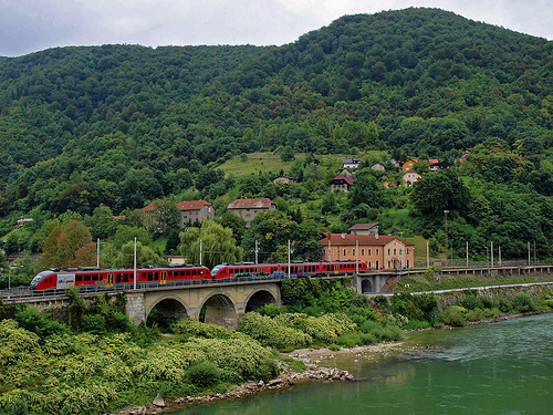 Železniška postaja Hrastnik